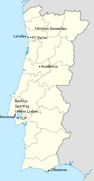 Carte des clubs participants du championnat du portugal de football de première division 1942-1943